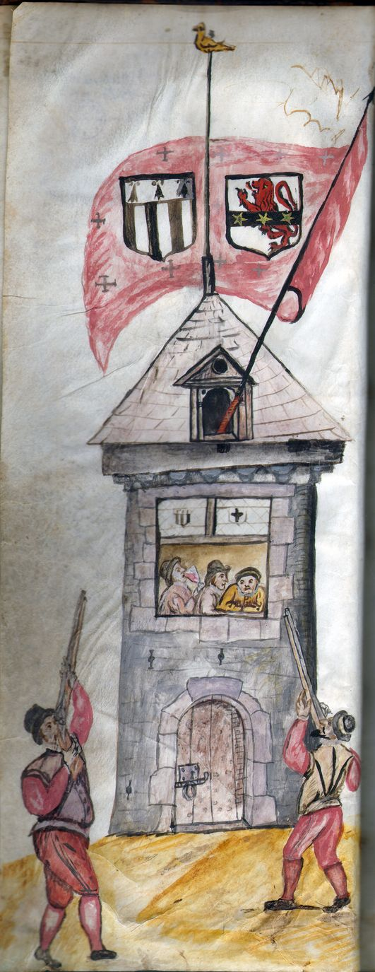 Arquebusiers s'entraînant au tir au papegaut sur la tour du Chêne (XVIe siècle), Rennes